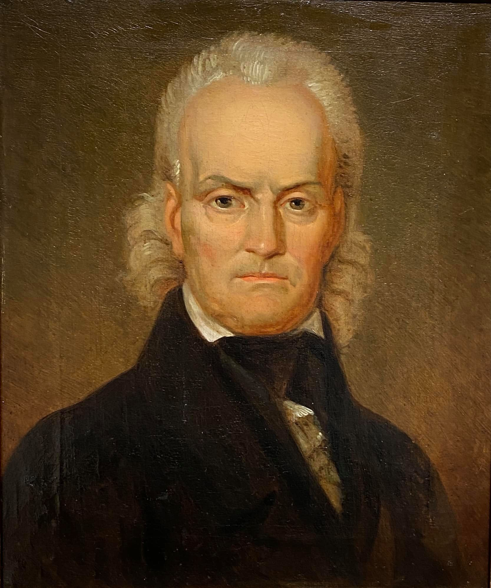 Беларуская (тарашкевіца): Партрэт Станіслава Баніфацыя Юндзіла (Stanisłaŭ Jundził)